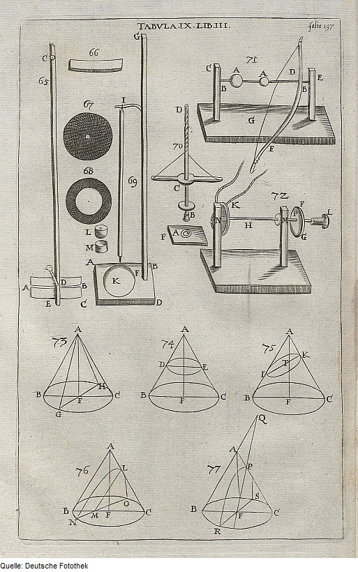 Original image description from the Deutsche Fotothek Optik & Instrument & Dioptrik & Linse & konvex & konkav & Kegel